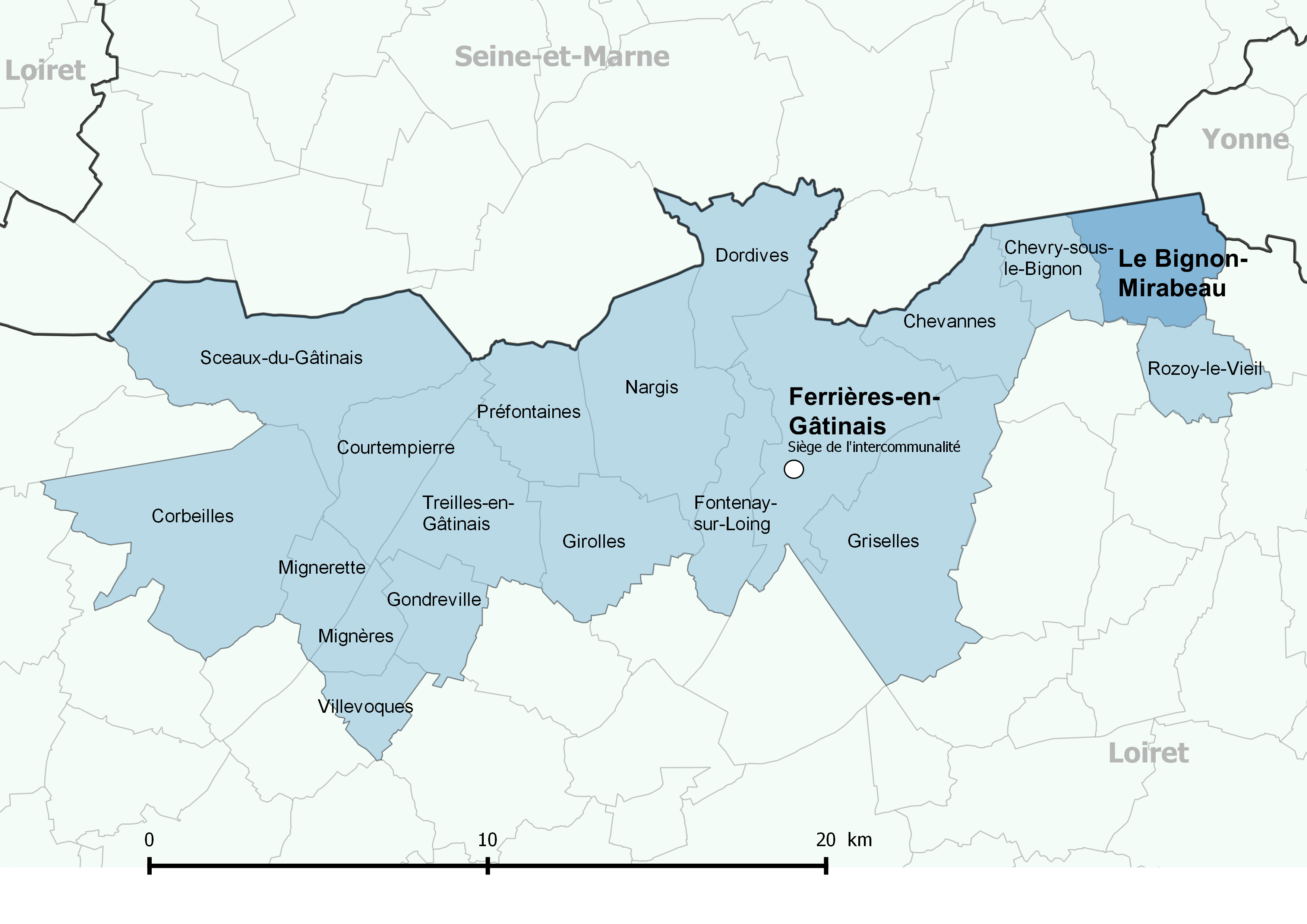 Périmètre de la communauté de communes des Quatre Vallées (Loiret) - Positionnement de la commune de Le Bignon-Mirabeau.